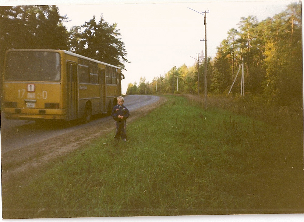 UAB "Kėdainių autobusų parkas" "Ikarus", 1-uoju nr. Babėnuose